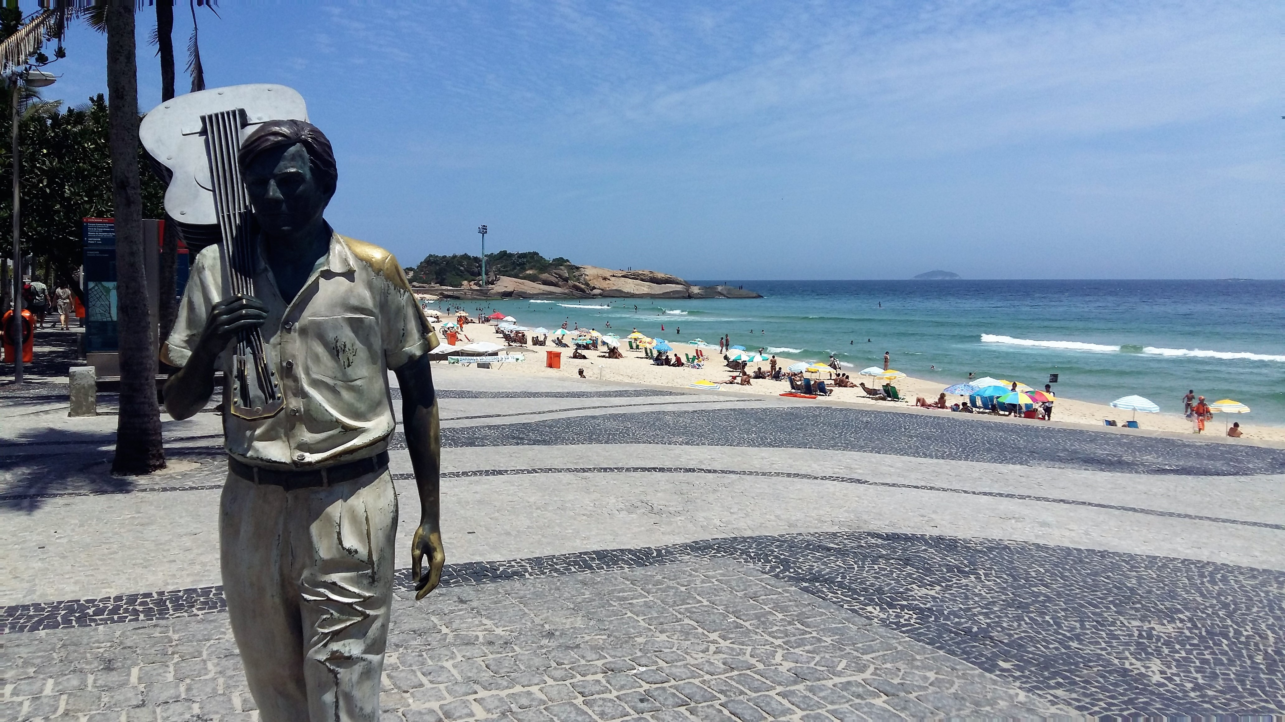 Estátua em homenagem ao compositor no Arpoador, [1]